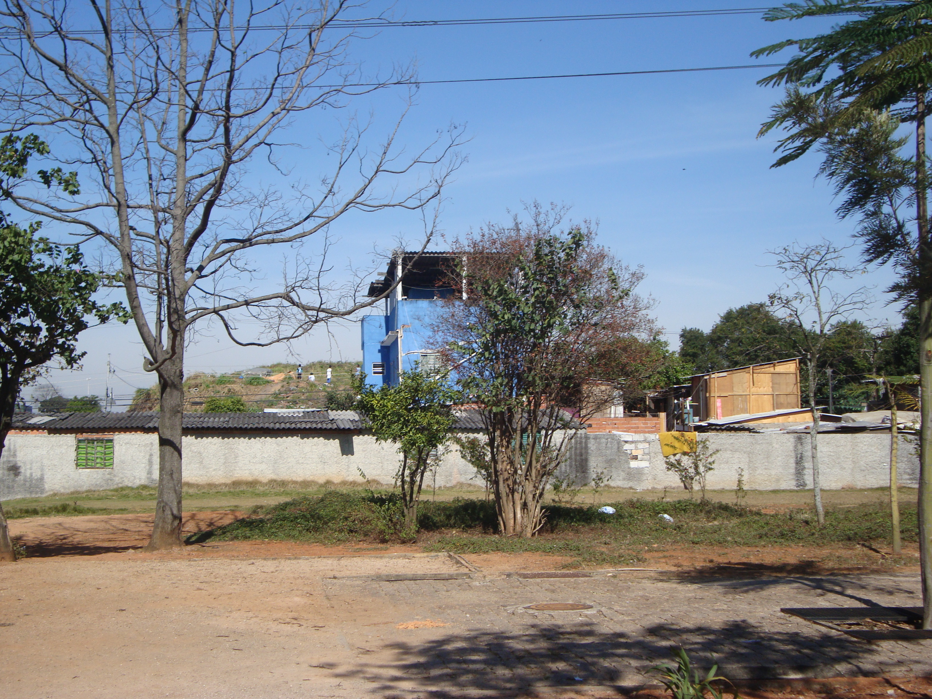 Local onde ficava a favela Zaki Narchi, em Santana distrito de São Paulo. Brasil